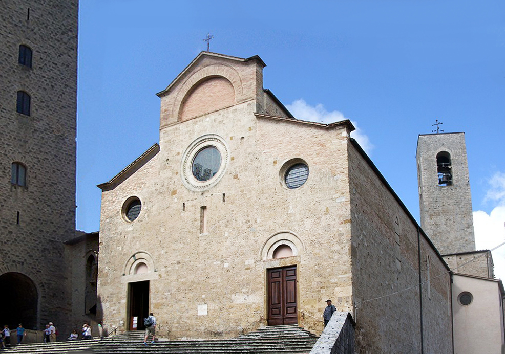 San Gimignano - Collegiata